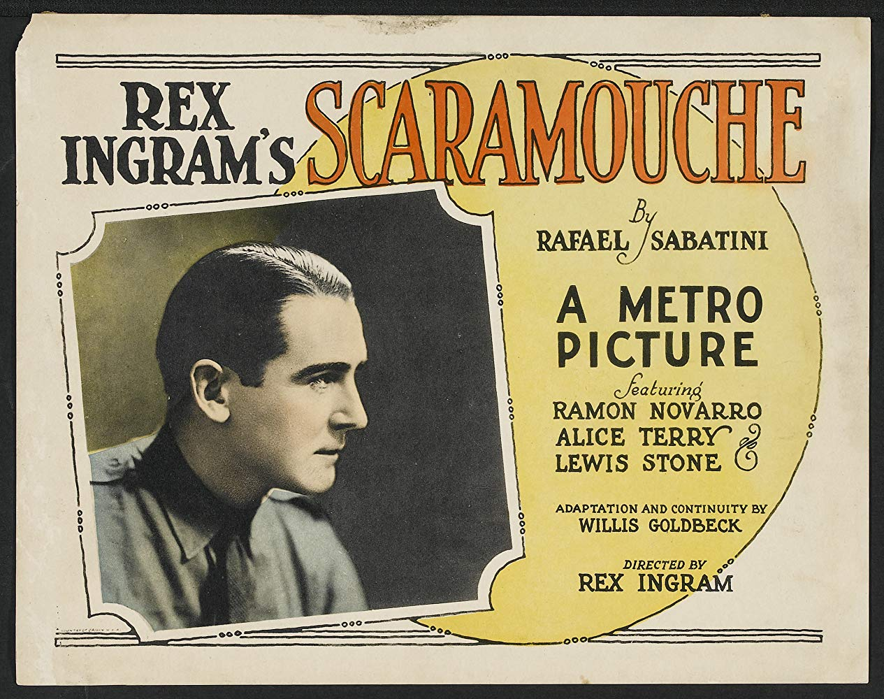 Афиша фильма «Скарамуш» (1923) с исполнителем заглавной роли Рамоном Наварро